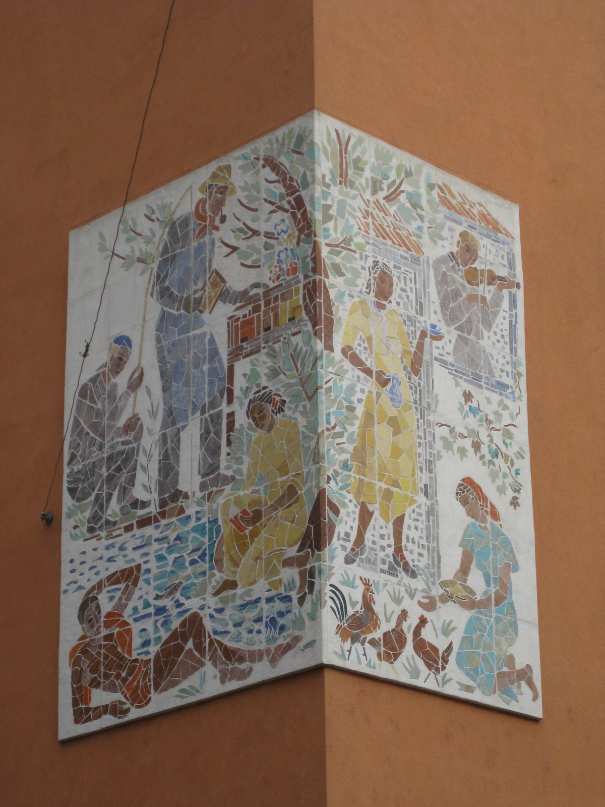 Wandmosaik Freizeitgestaltung von Hertha Bucher aus dem Jahre 1953 am Gemeindebau Josef-Haas-Hof in Wien-Simmering.